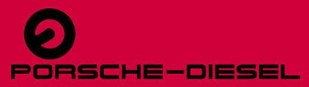 Porsche-Diesel Motorenbau logó